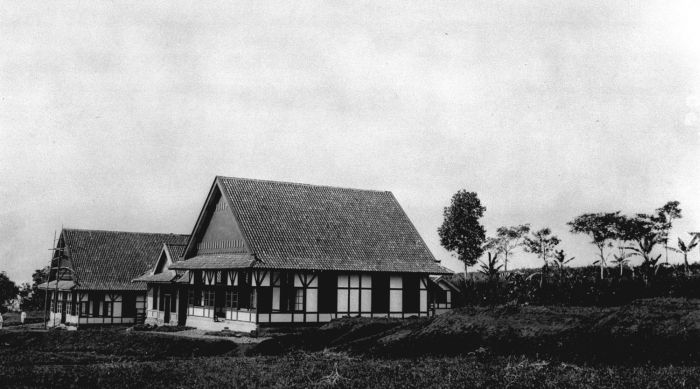 Foto. Exterieur van het sanatorium van Patjet ten zuiden van Bandoeng.